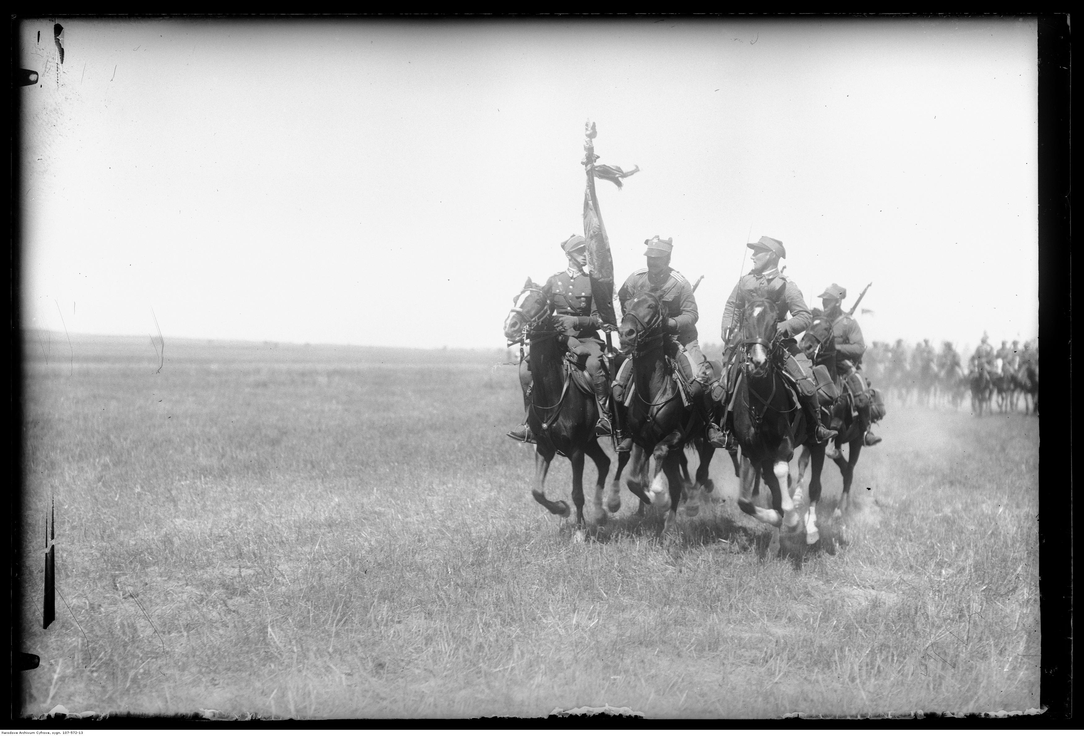 Defilada 7 Pułku Ułanów. Na przedzie poczet sztandarowy.